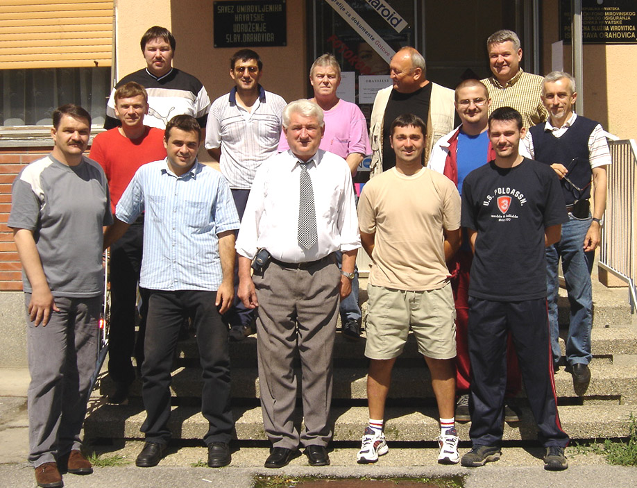 Enigmatska udruga Orahovica